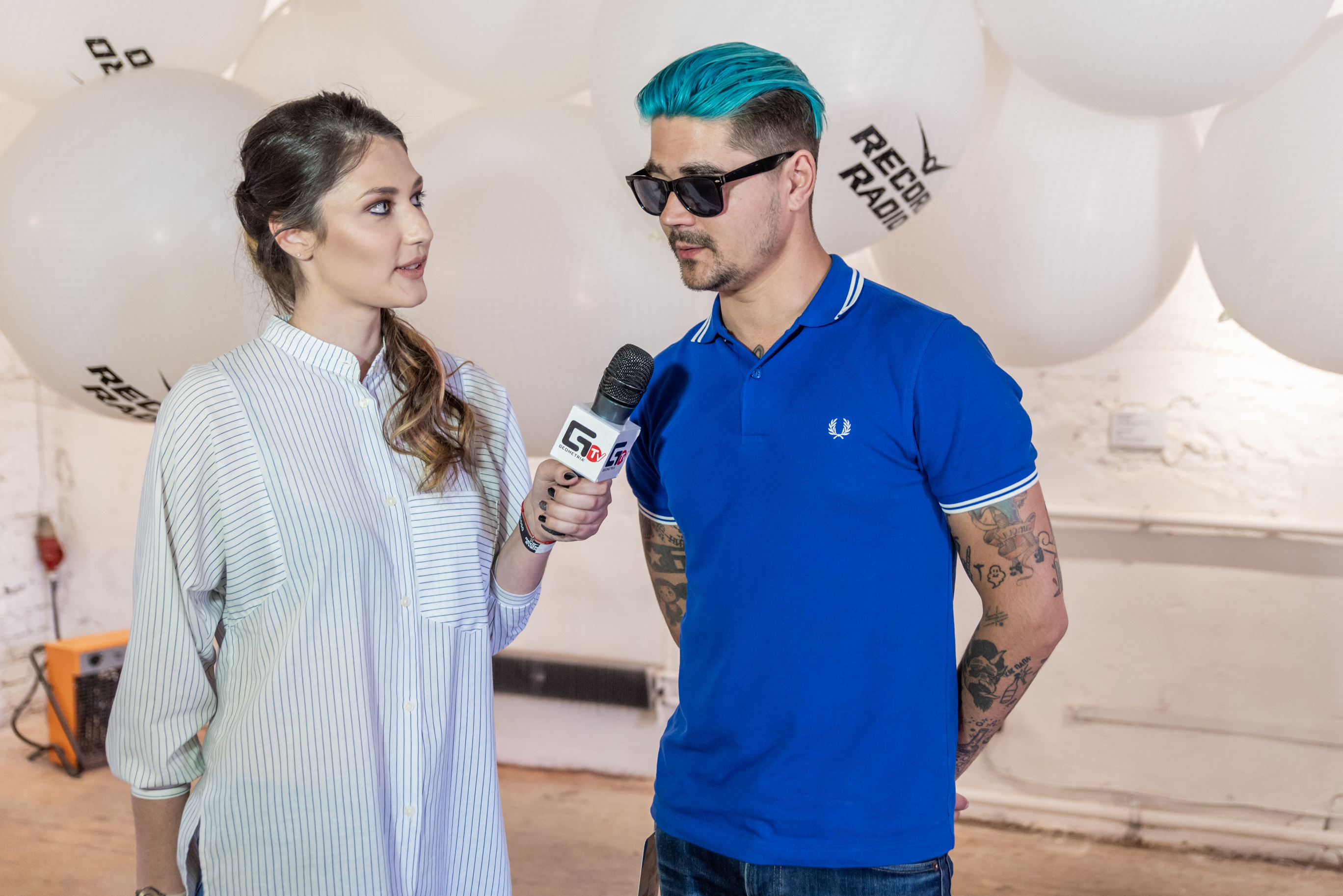 Юрий Музыченко 26 мая 2018 года на фестивале «Видфест» в Санкт-Петербурге